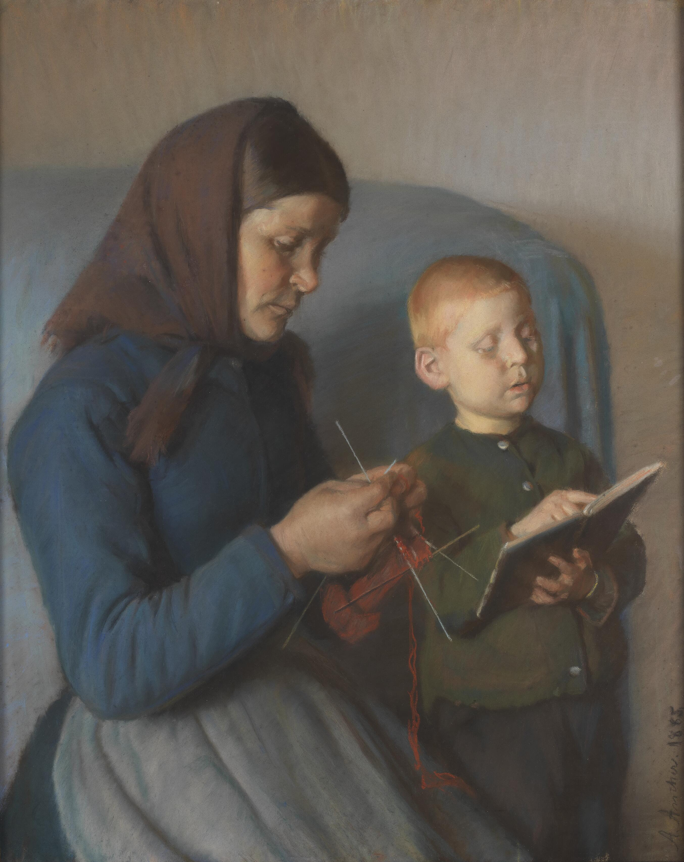 Anna Ancher (1859-1935), Lektien gennemgaaes, 1885